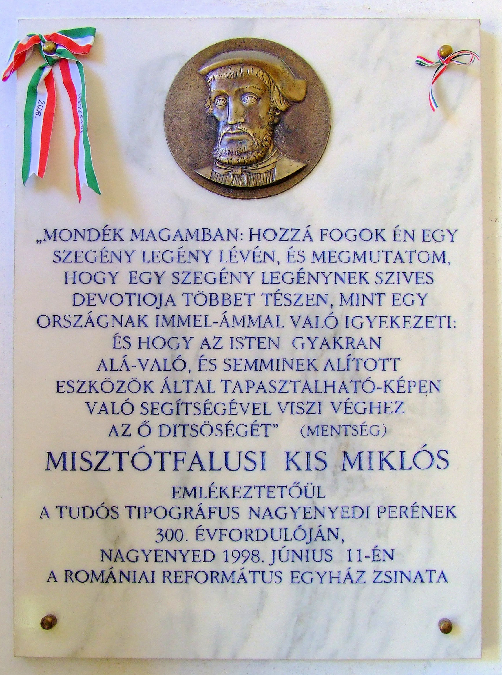 Misztótfalusi Kis Miklós enléktáblája Nagyenyeden